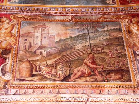 R.Passagrilli - Amelia Palazzo Boccarini - PArticolare fascione affrescato (sec XVI)